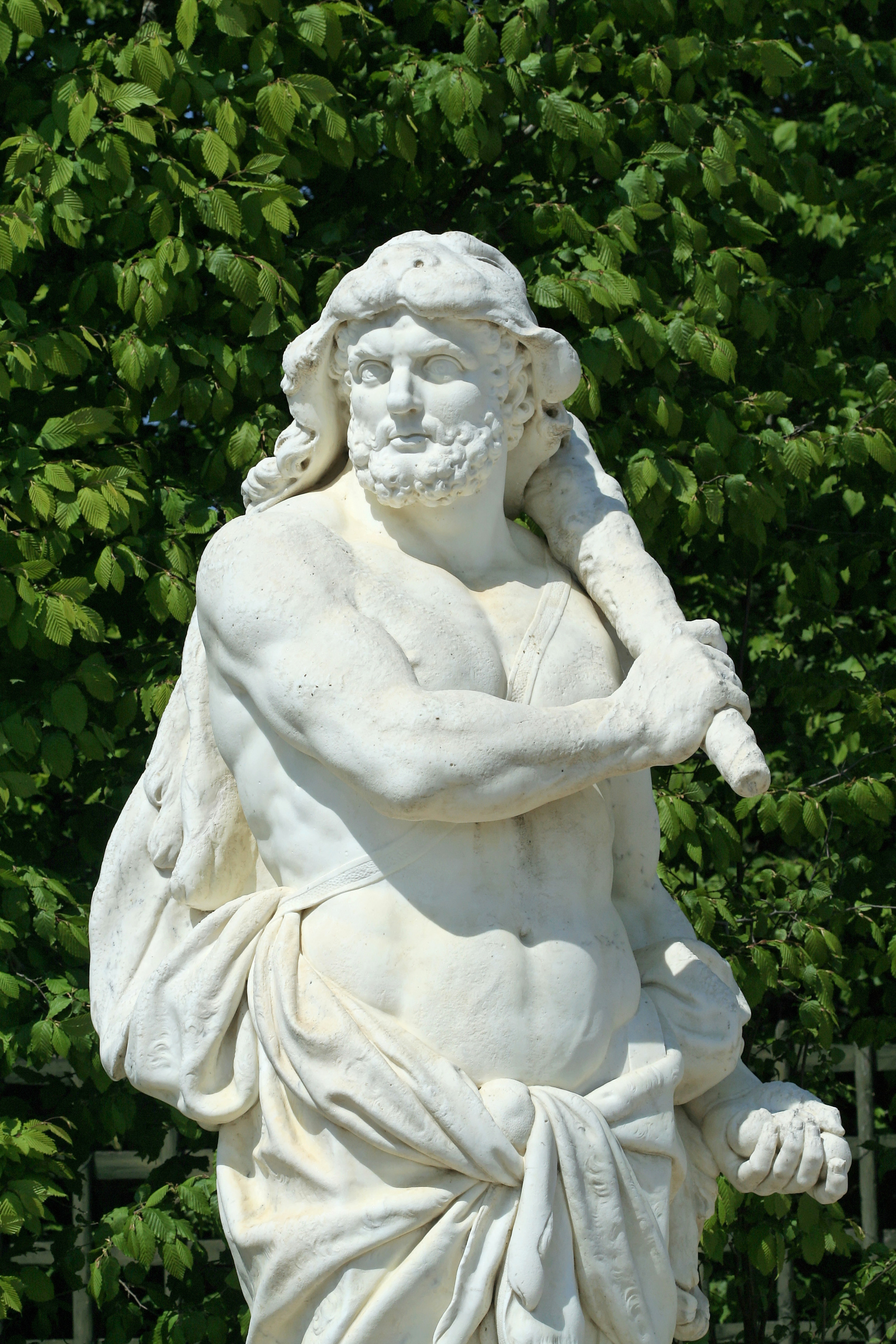 Parc de Versailles, demi-lune du parterre de Latone, Hercule, par Louis Leconte.